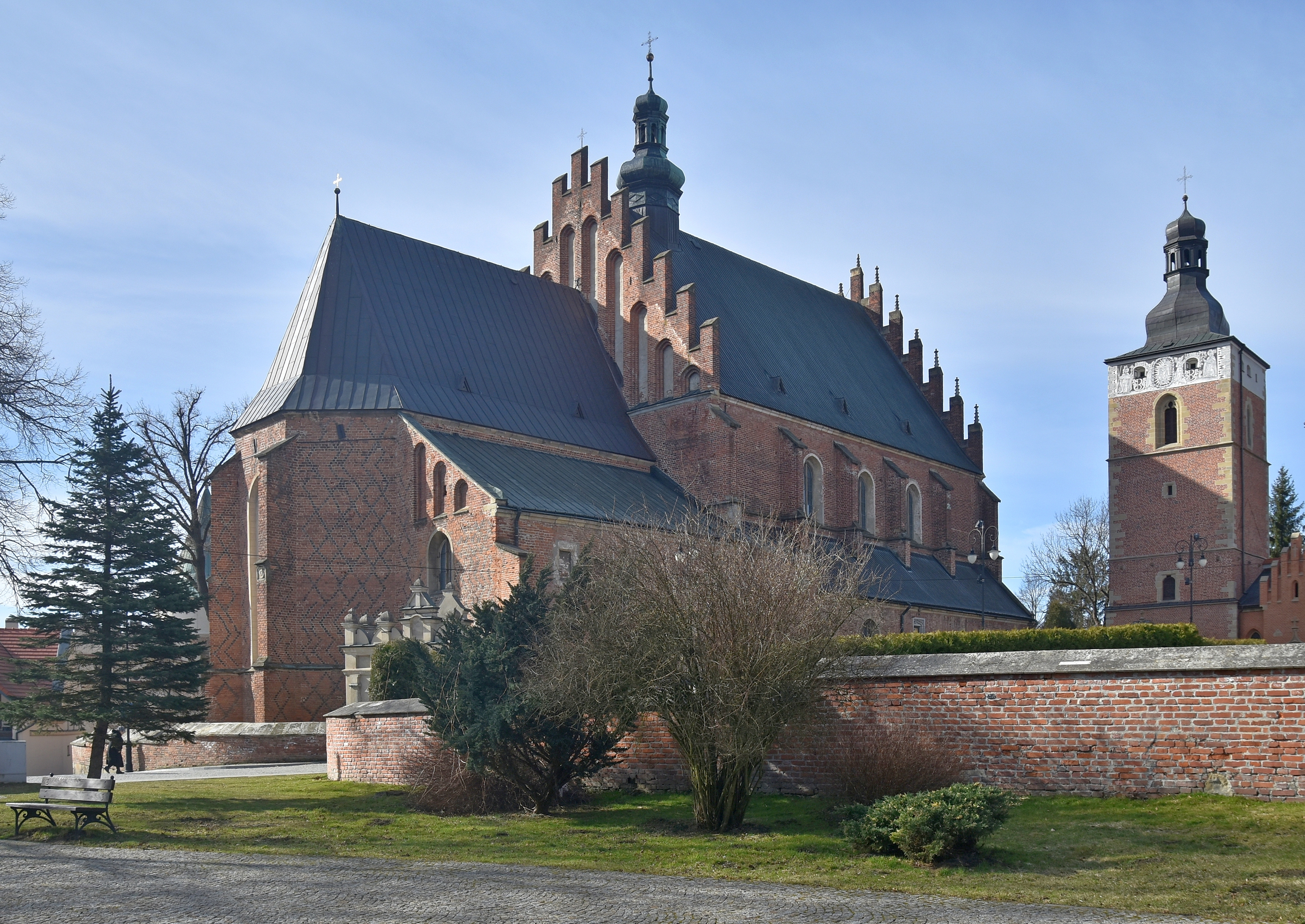 miasto Biecz